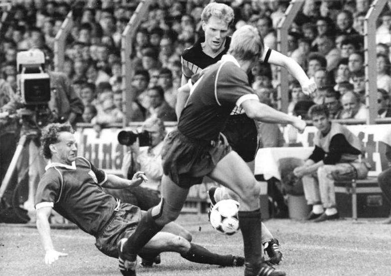 ADN-ZB-Oberst-5.8.89-sche- Cottbus: Fußball-Supercup SG Dynamo Dresden (Meister) - BFC Dynamo (Pokalsieger) 1:4- Die Berliner Jörg Buder (l) und Marco Köller (vorn) kämpfen mit dem Dresdner Nationalspieler Matthias Sammer um den Ball.